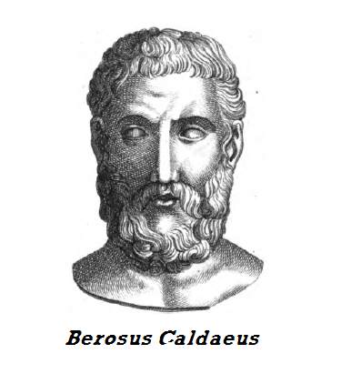 Presunto ritratto di Berosso